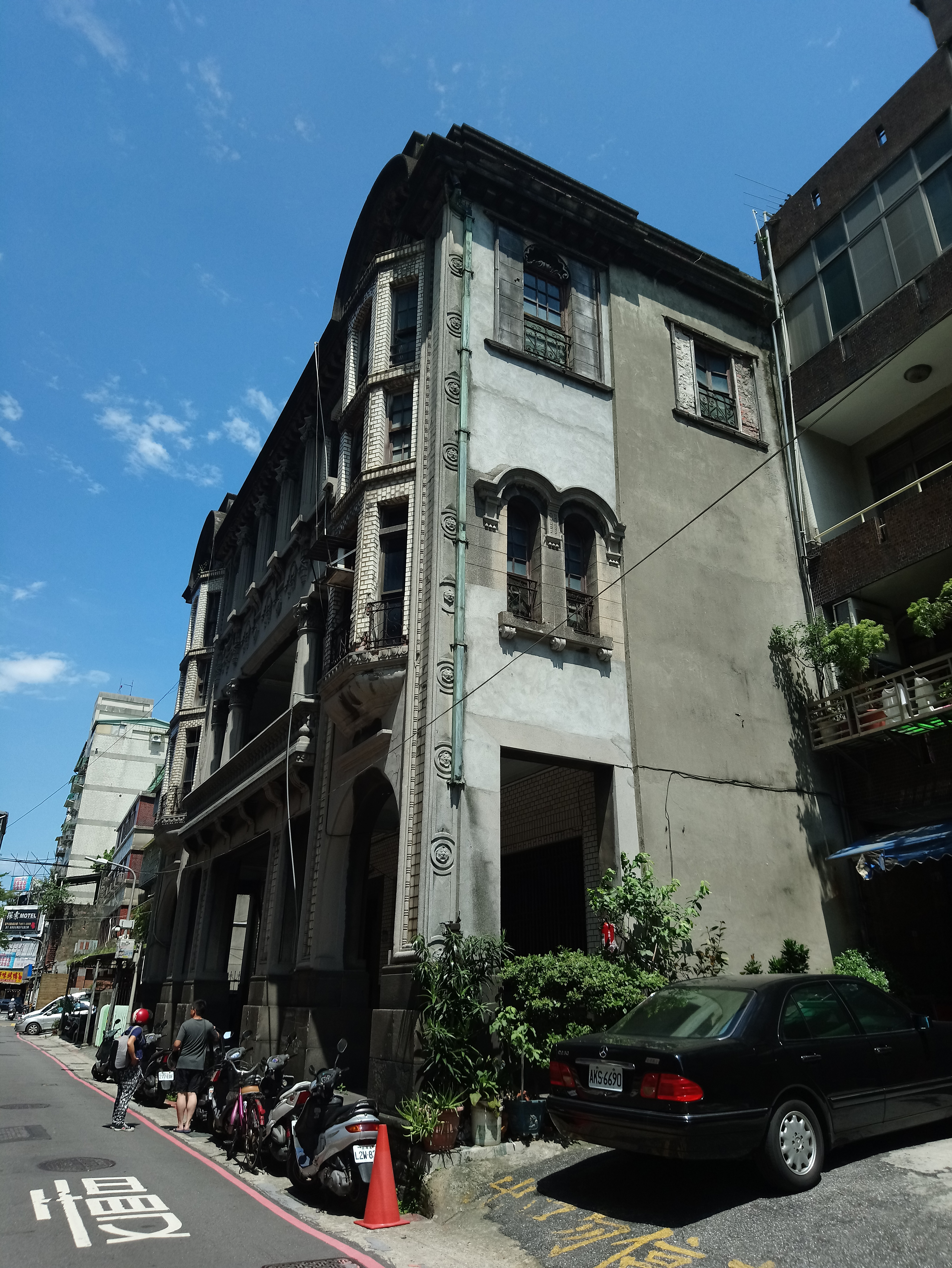 陳天來故居側邊,台北市大同區延平次分區永樂里